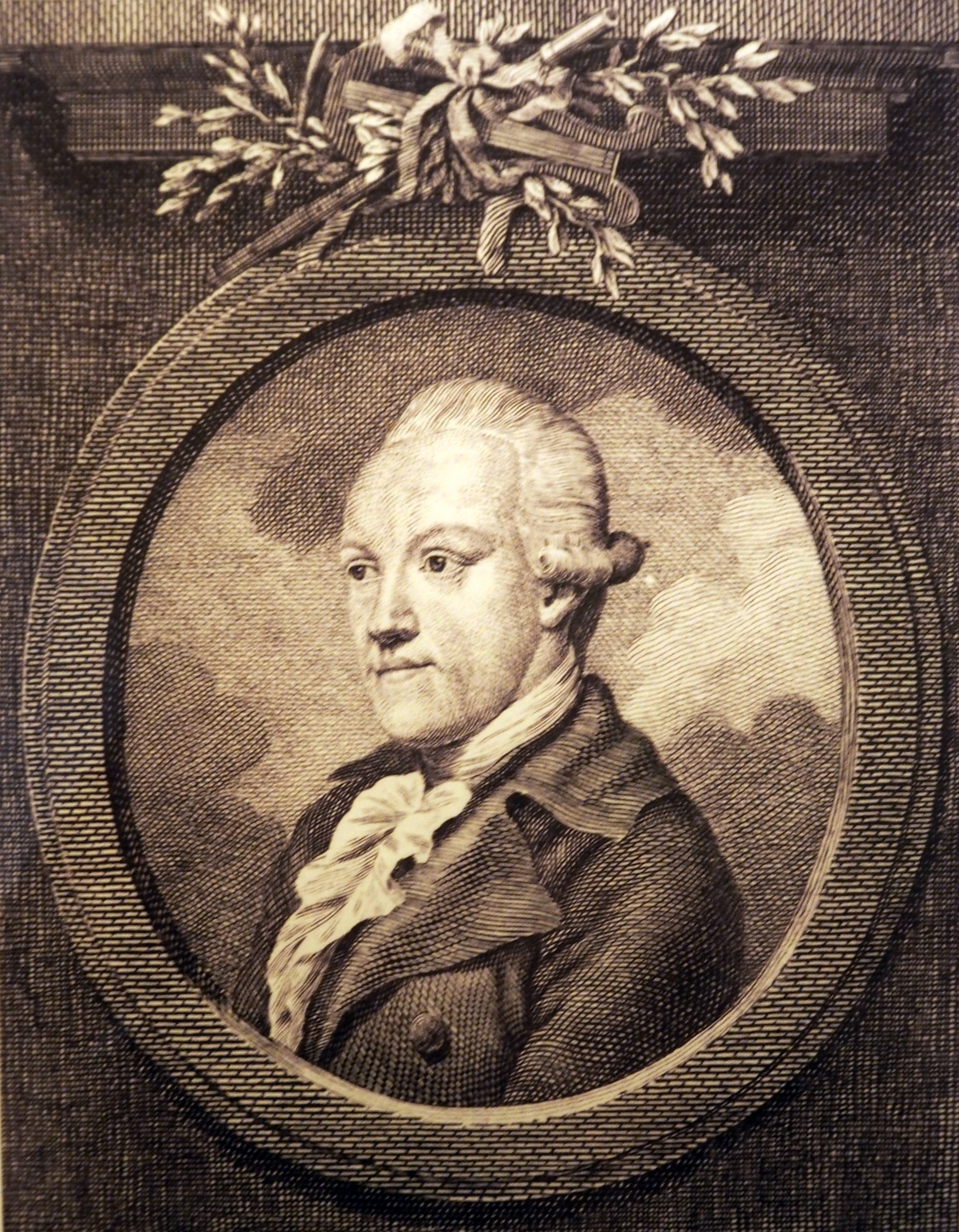 Christian Jakob Wagenseil This is a faithful photographic reproduction of a two-dimensional, public domain work of art. The work of art itself is in the public domain for the following reason: This work is in the public domain in its country of origin and other countries and areas where the copyright term is the author's life plus 100 years or less. You must also include a United States public domain tag to indicate why this work is in the public domain in the United States. This file has been identified as being free of known restrictions under copyright law, including all related and neighboring rights. The official position taken by the Wikimedia Foundation is that "faithful reproductions of two-dimensional public domain works of art are public domain". This photographic reproduction is therefore also considered to be in the public domain in the United States. In other jurisdictions, re-use of this content may be restricted; see Reuse of PD-Art photographs for details.